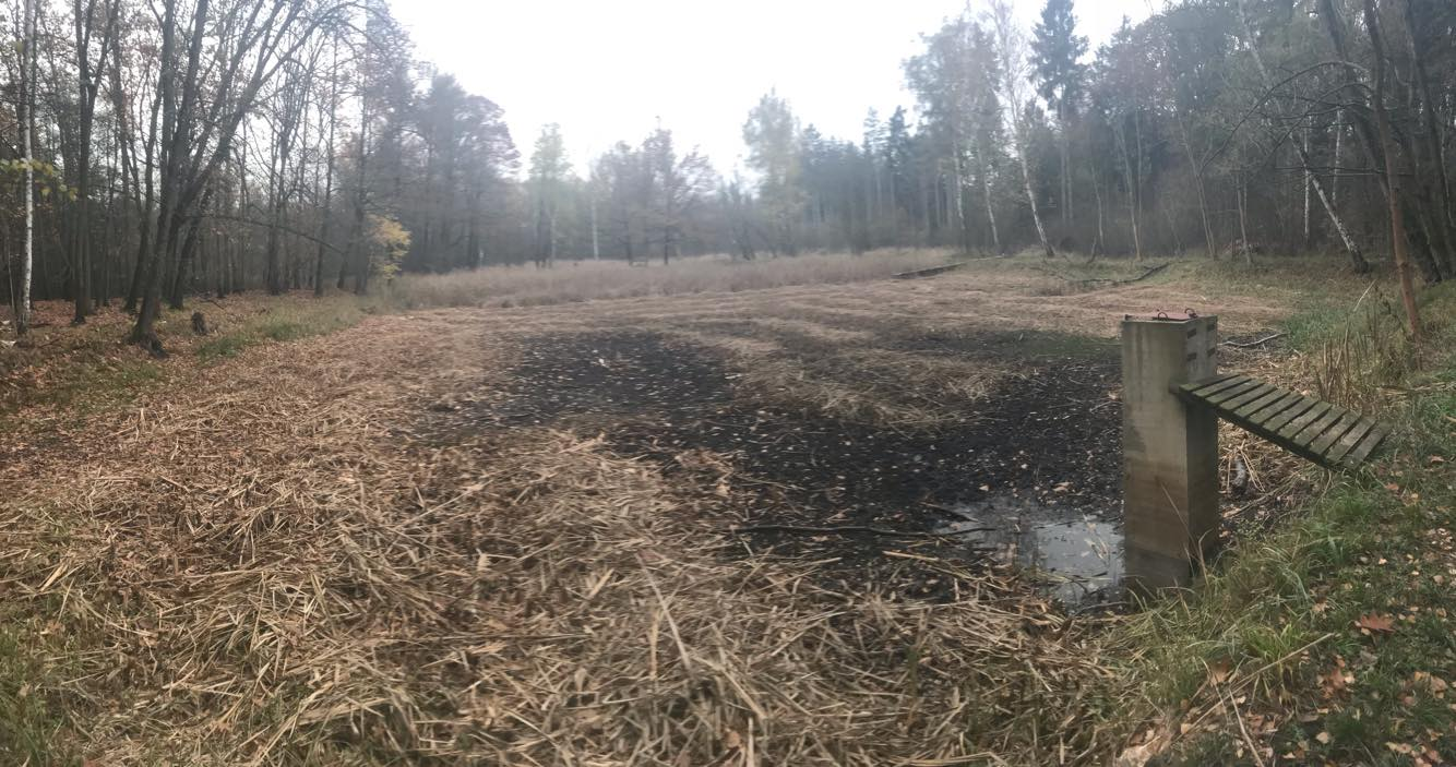 Vzdálený pohled na prostřední rybníček.